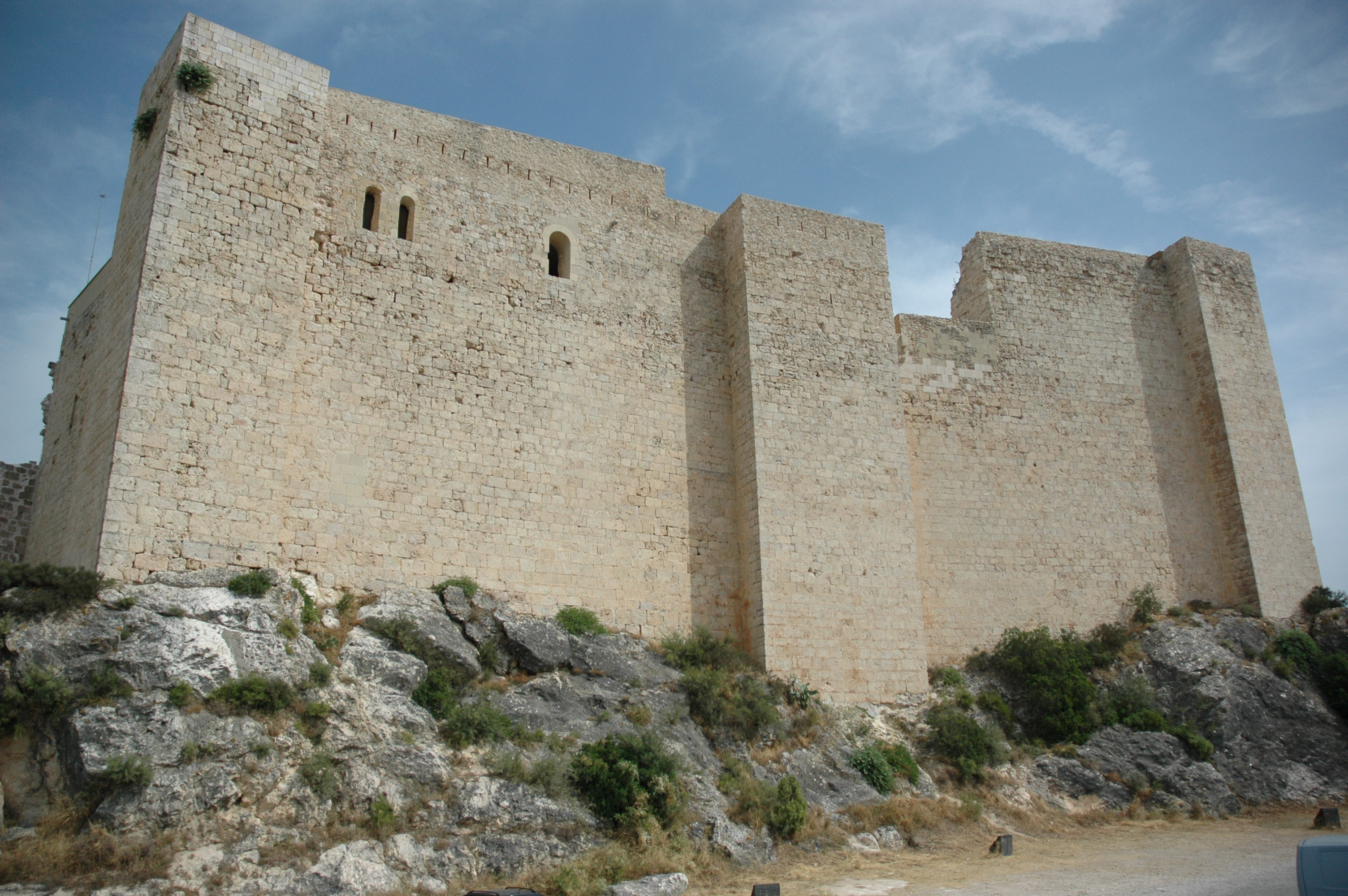 Castell de Miravet - General